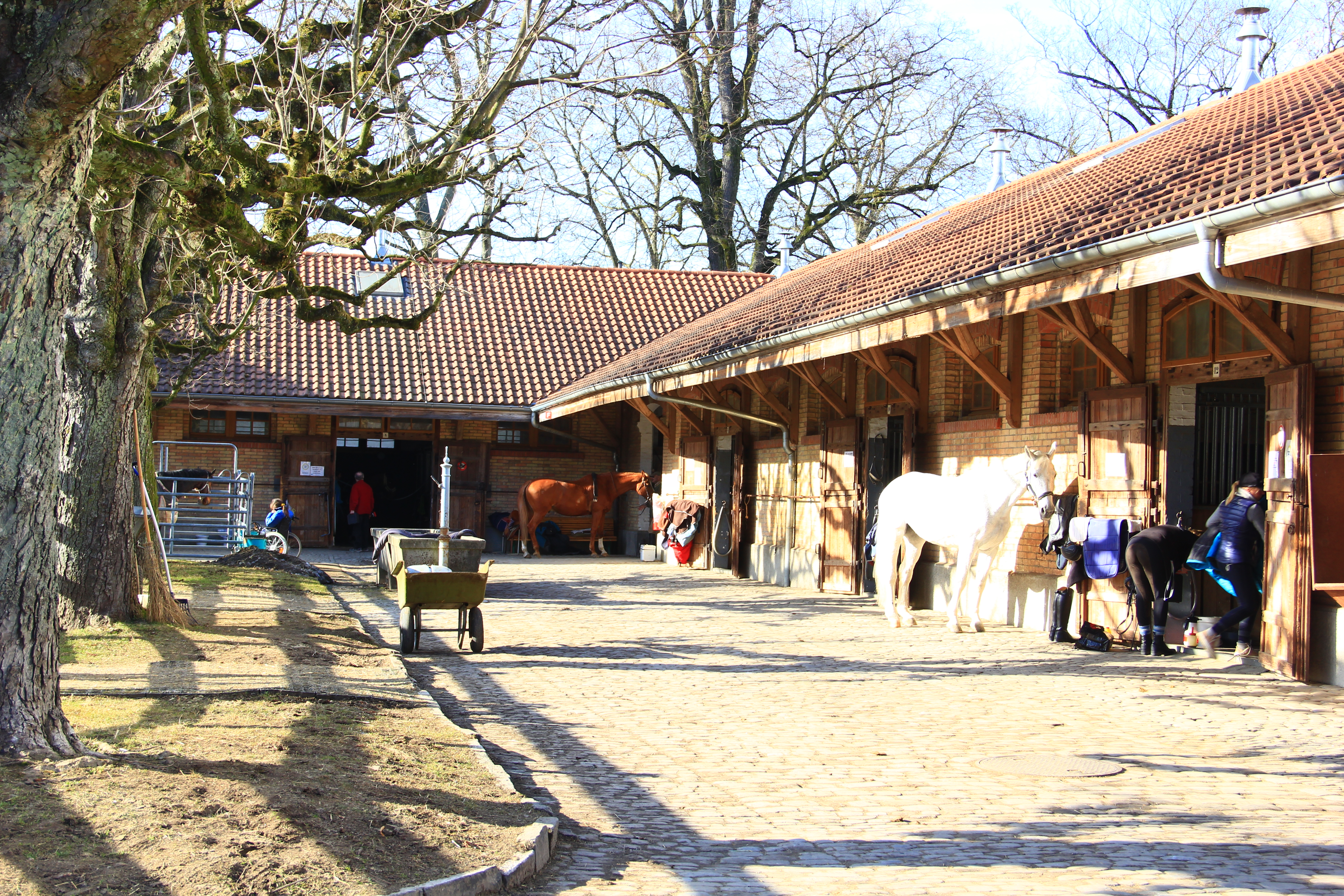 Ställe des Nationalen Pferdezentrums Bern